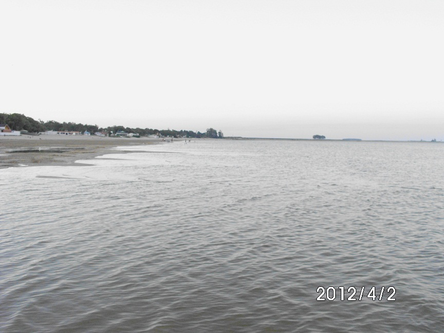 playa